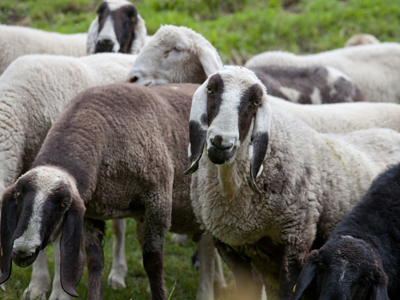 Saaser Mutte im Mattmarkgebiet im Saastal 2015